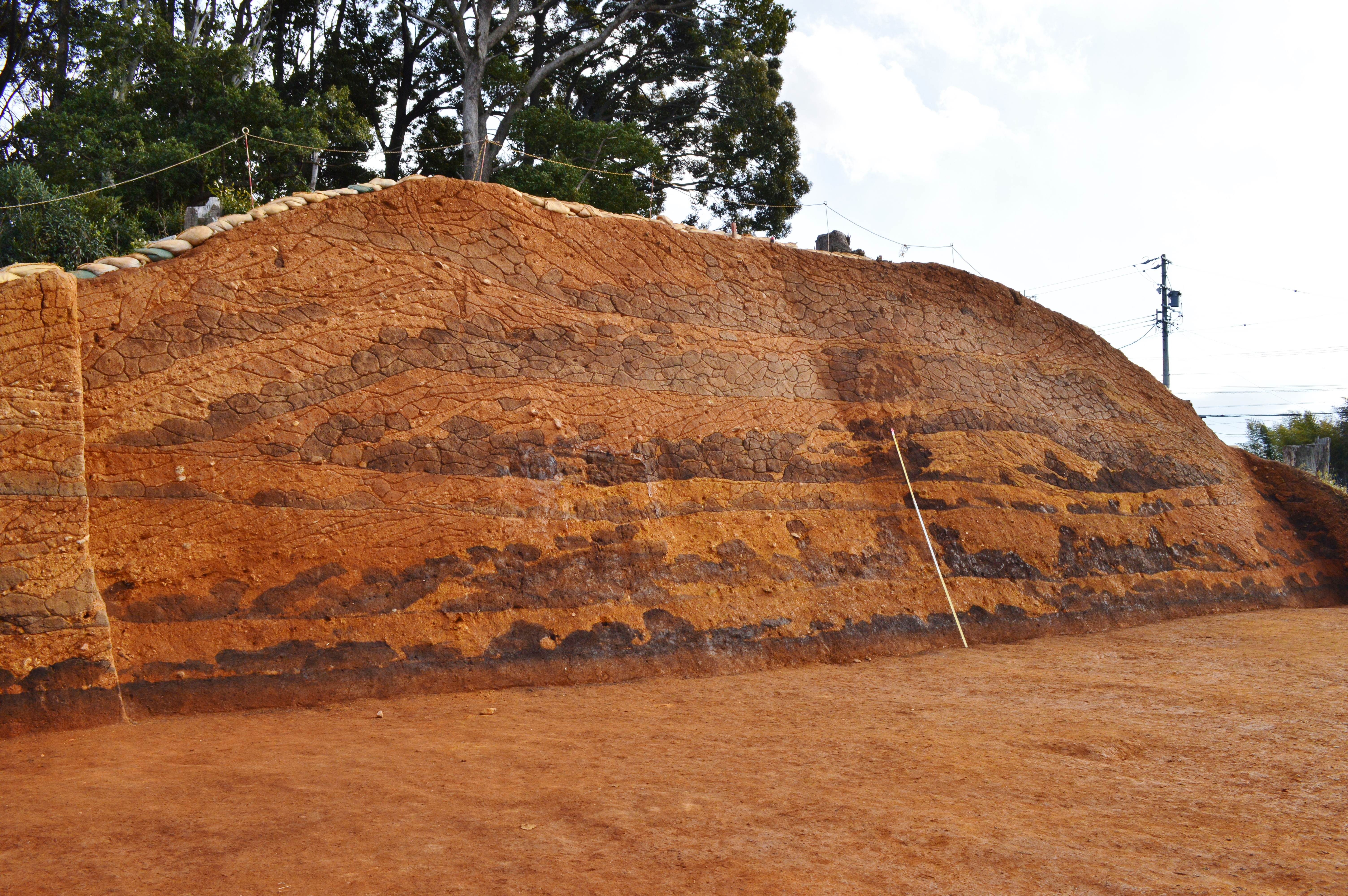 船山1号墳 (豊川市) 墳丘断面